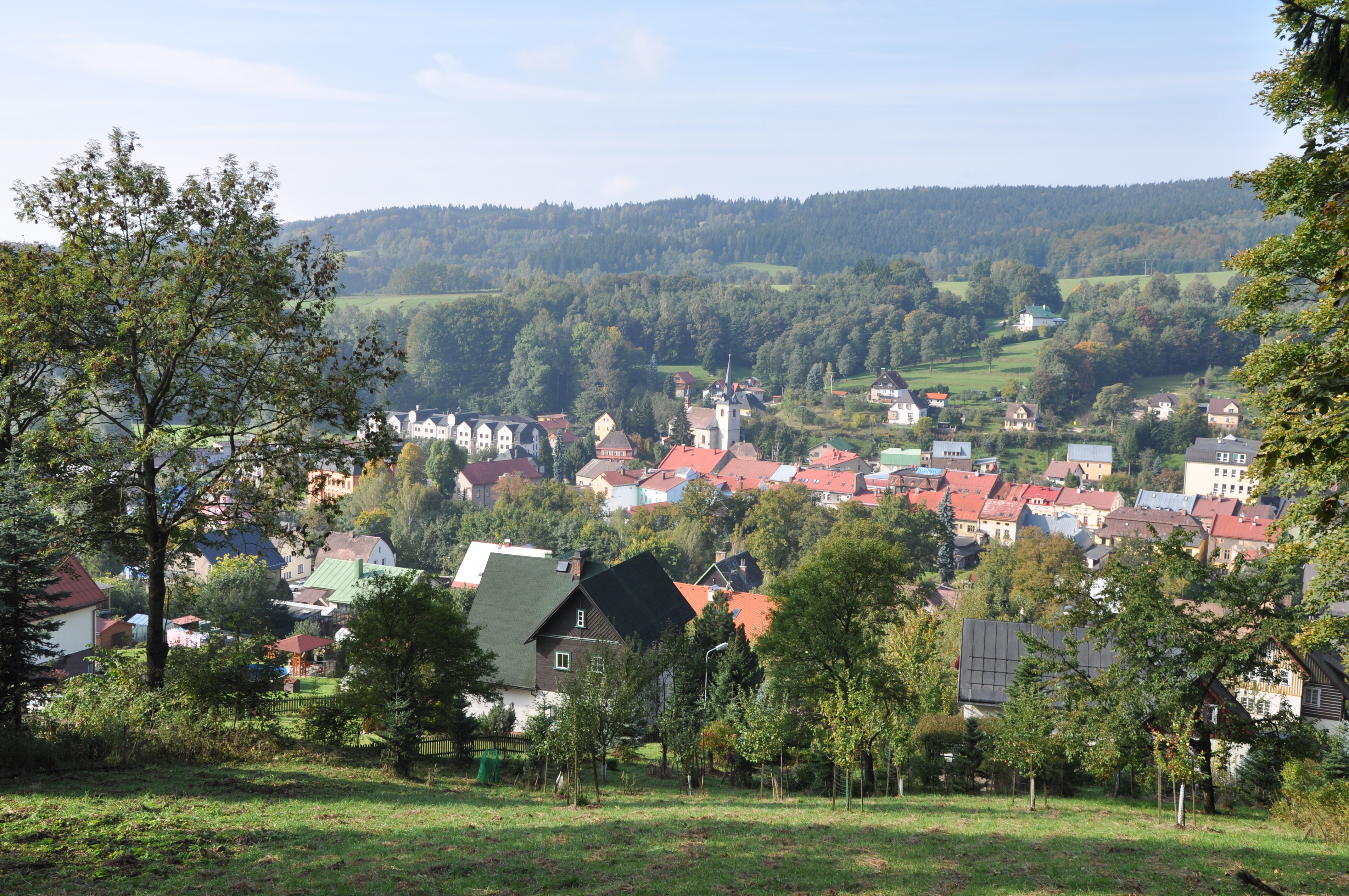 Svoboda nad Úpou z Růženiny cesty